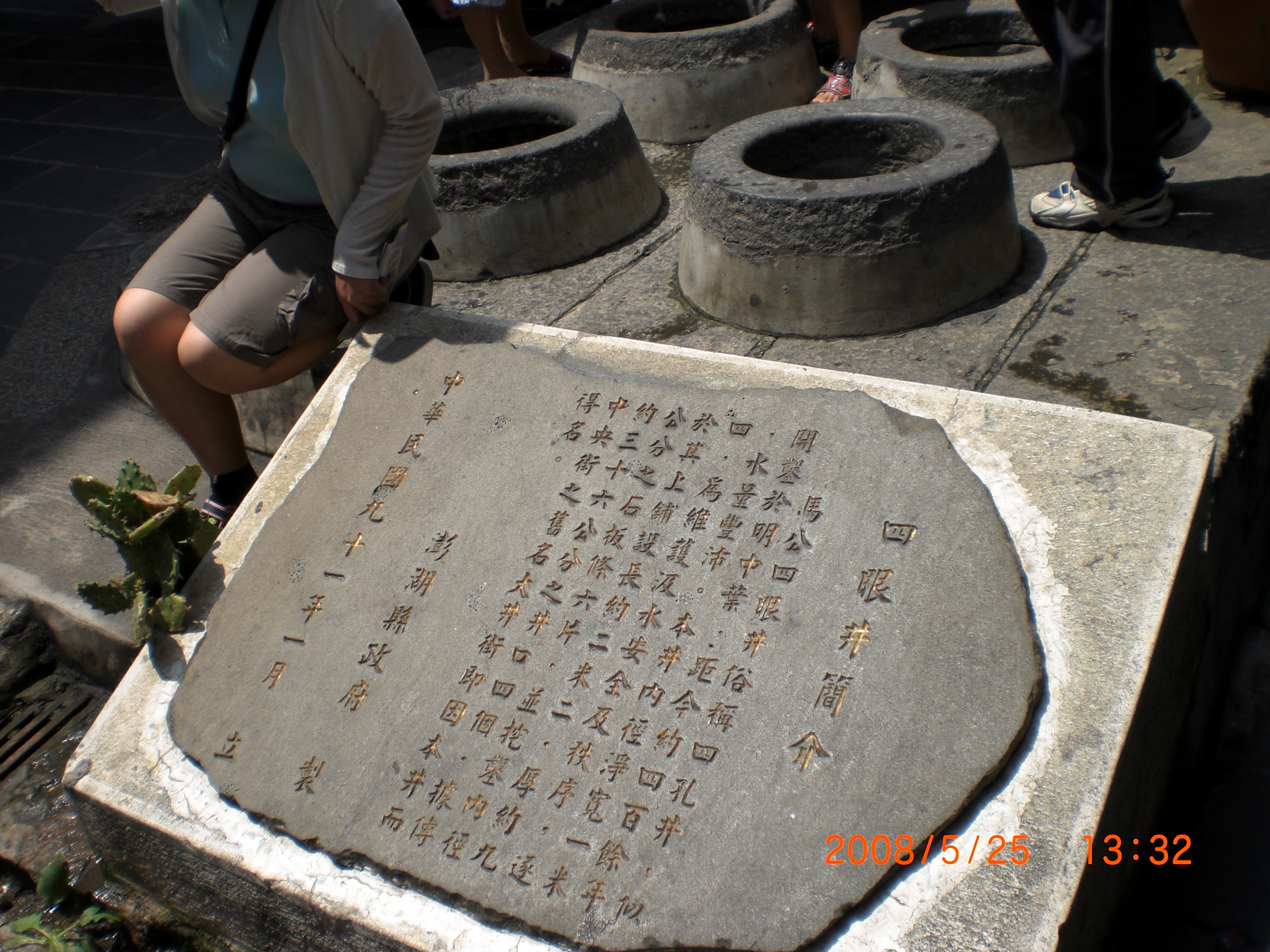 澎湖縣政府於2002年（中華民國91年）1月建立的四眼井簡介。